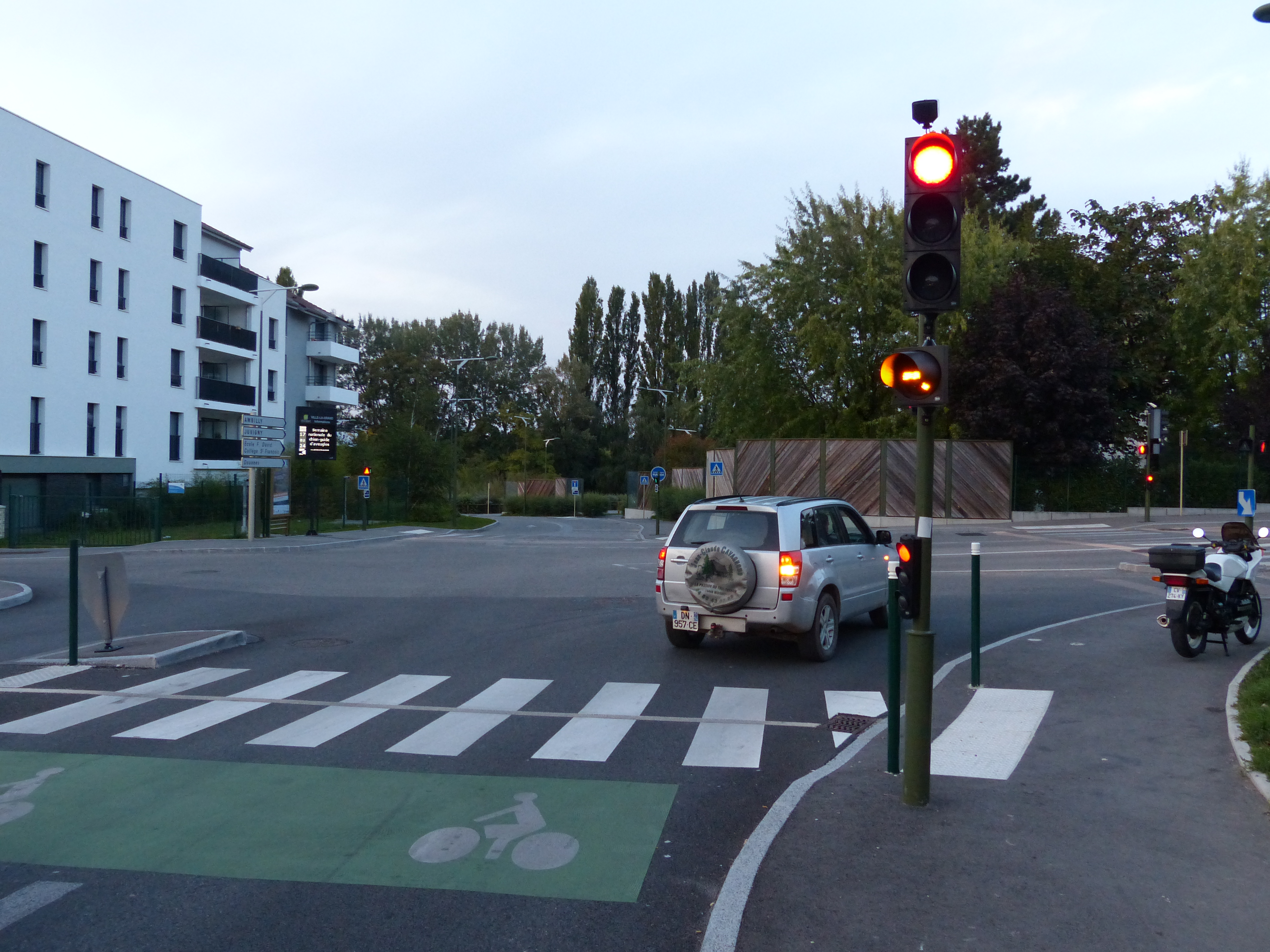 Signal d’anticipation directionnel R16td, feux rouge et clignotant allumés, croisement rue Léon-Bourgeois et rue des Voirons, Ville-la-Grand, Haute-Savoie.